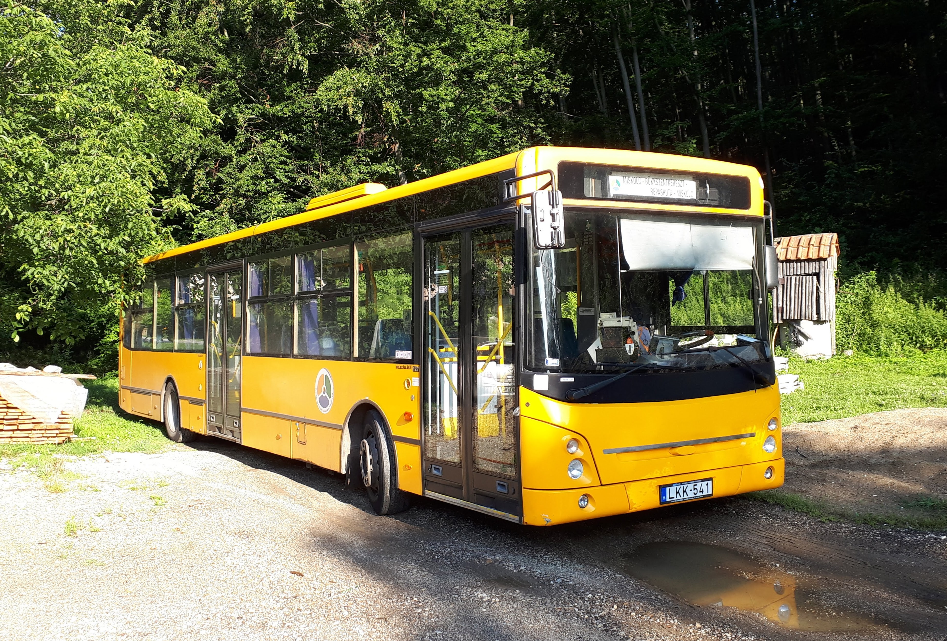 Az ÉMKK LKK-541 rendszámú Ikarus-ARC E127 típusú busza Répáshután, a 3755-ös helyközi járaton.